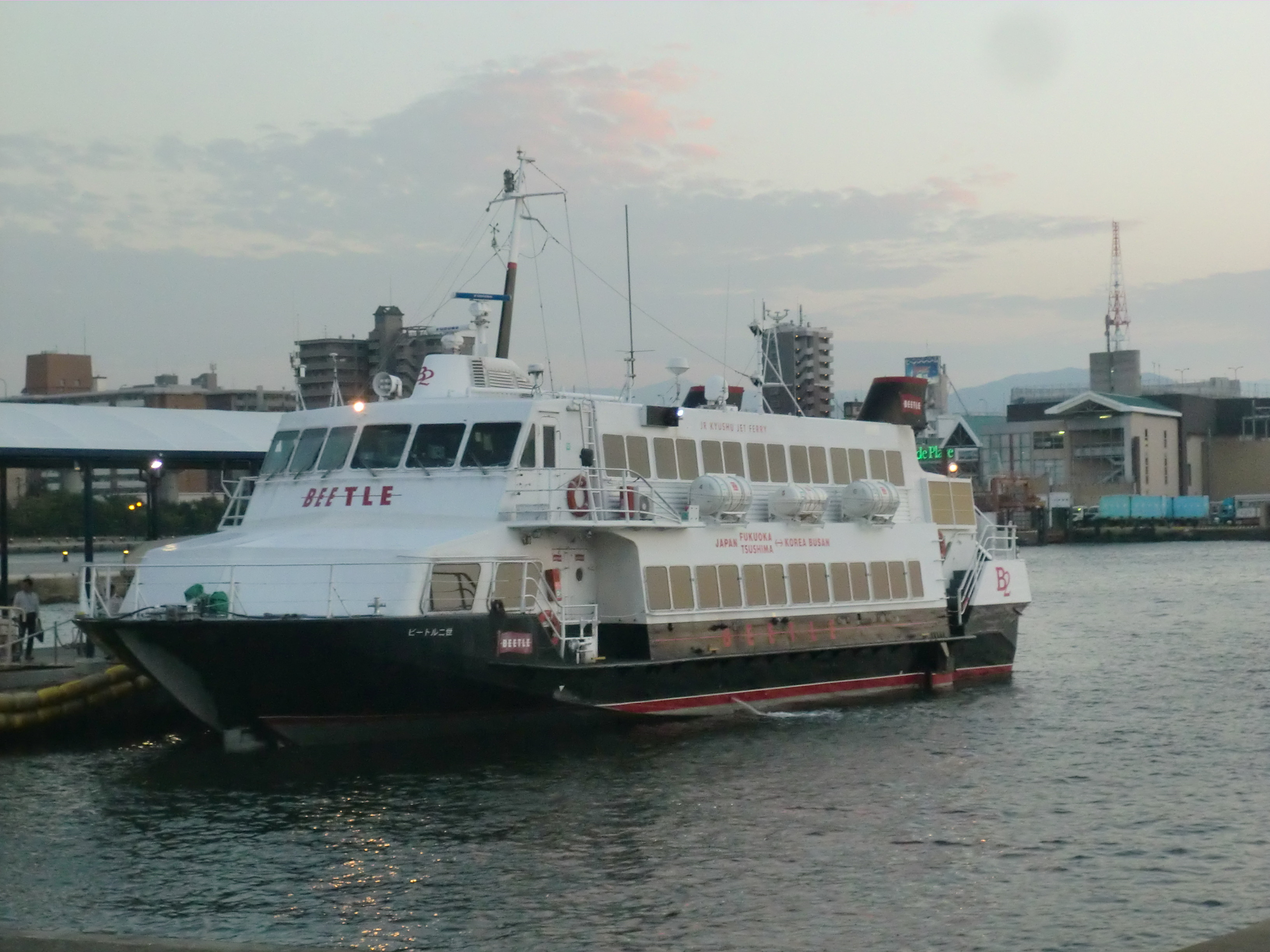 ビートル2世